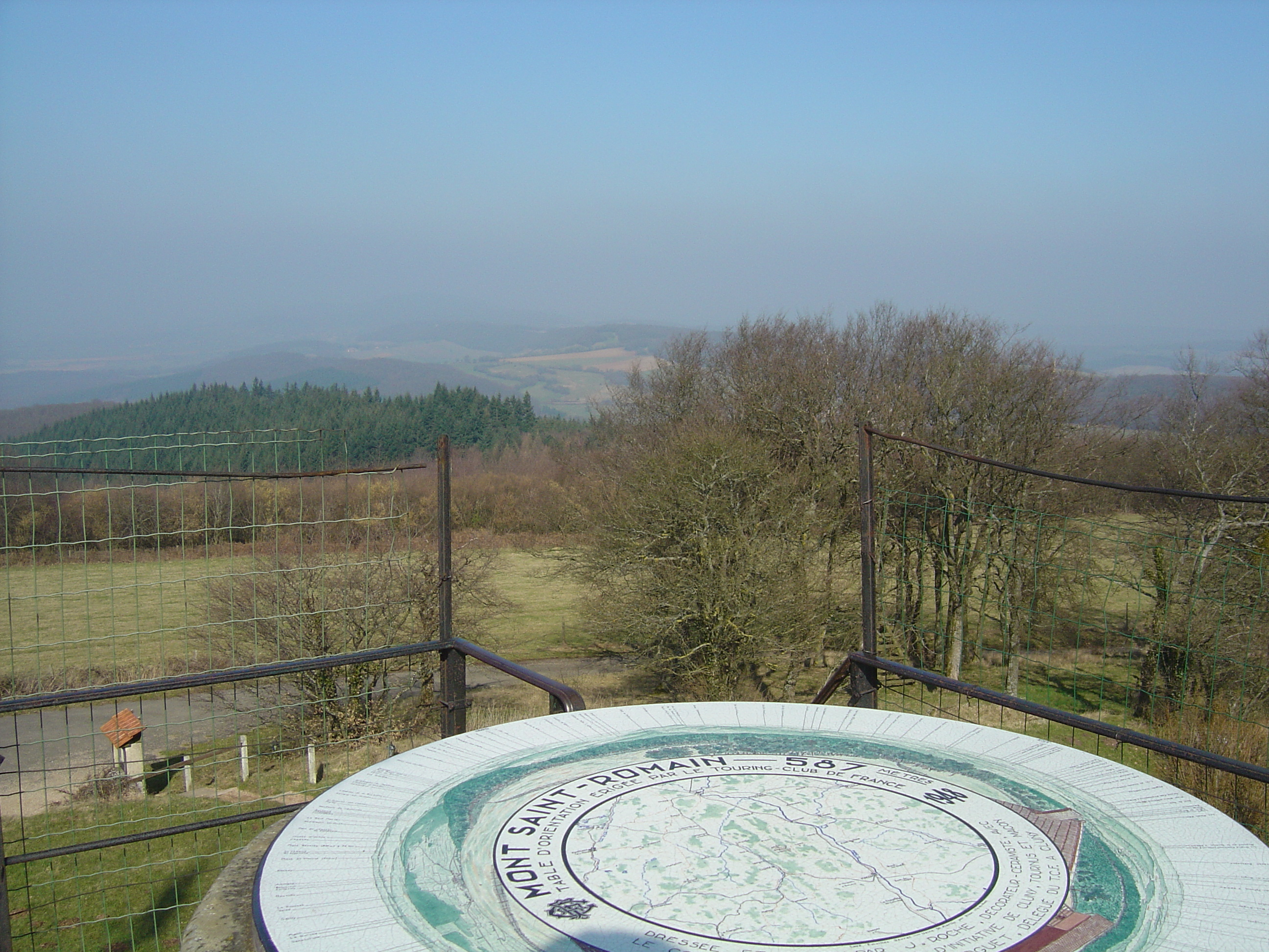 Table d'orientation du Mont Saint-Romain (579m). Bourgogne;Saône et Loire (71); Mâconnais; Blanot